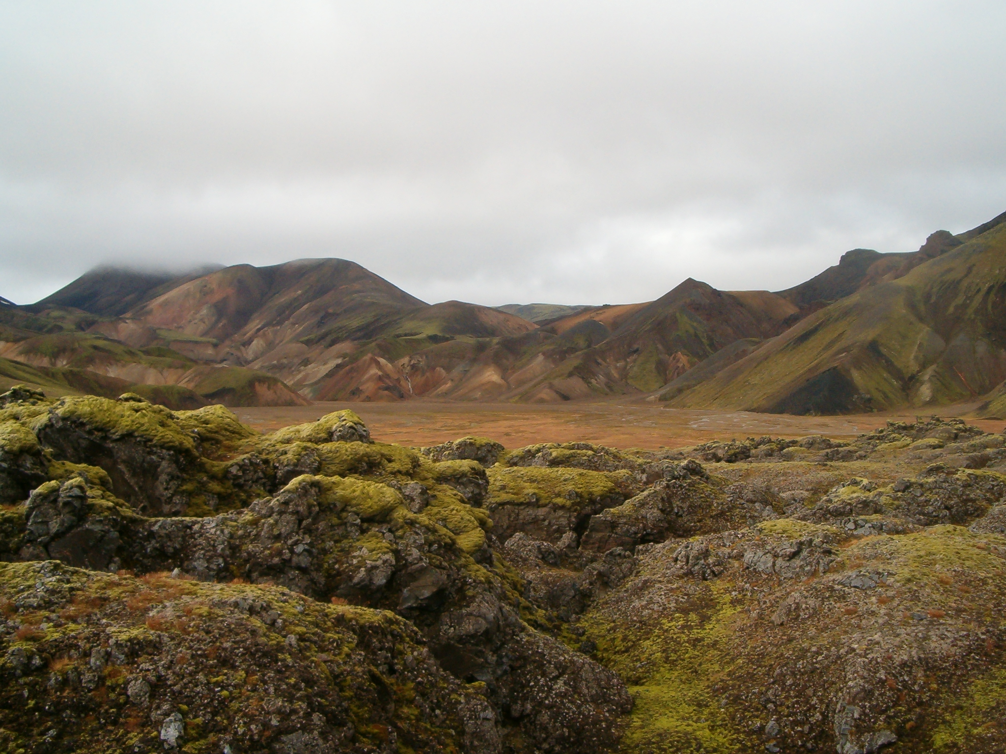 Úfið hraun í Landmannalaugum.